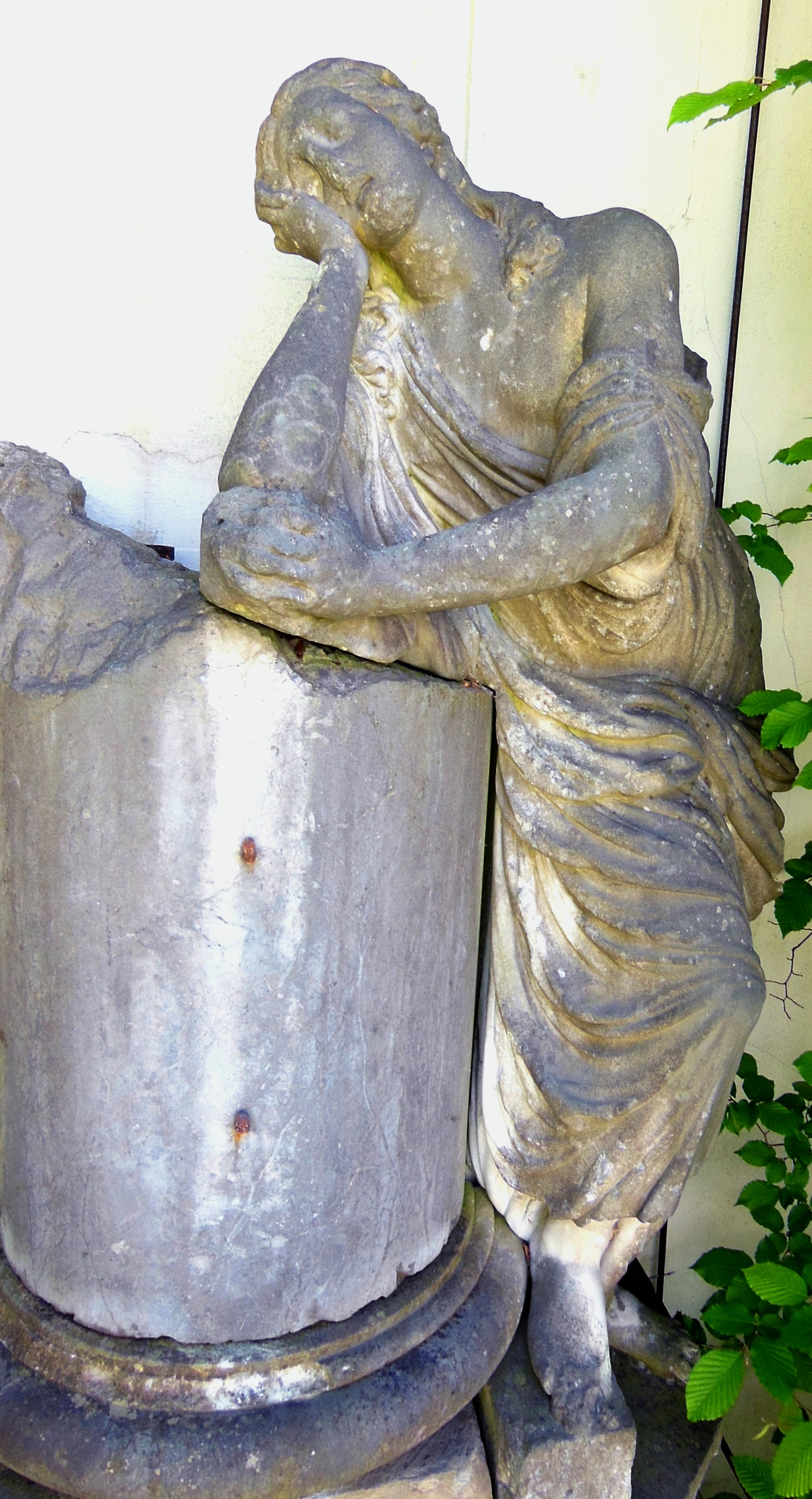 Ignaz Ingerl: Marmorstatue einer träumenden oder trauernden Frau im Garten des Schaetzlerpalais Augsburg aus einem 1965 abgebrochenen Freundschaftstempel des Augsburger Bankiers Christian III. von Münch im Garten des Schlosses Aystetten (um 1785).